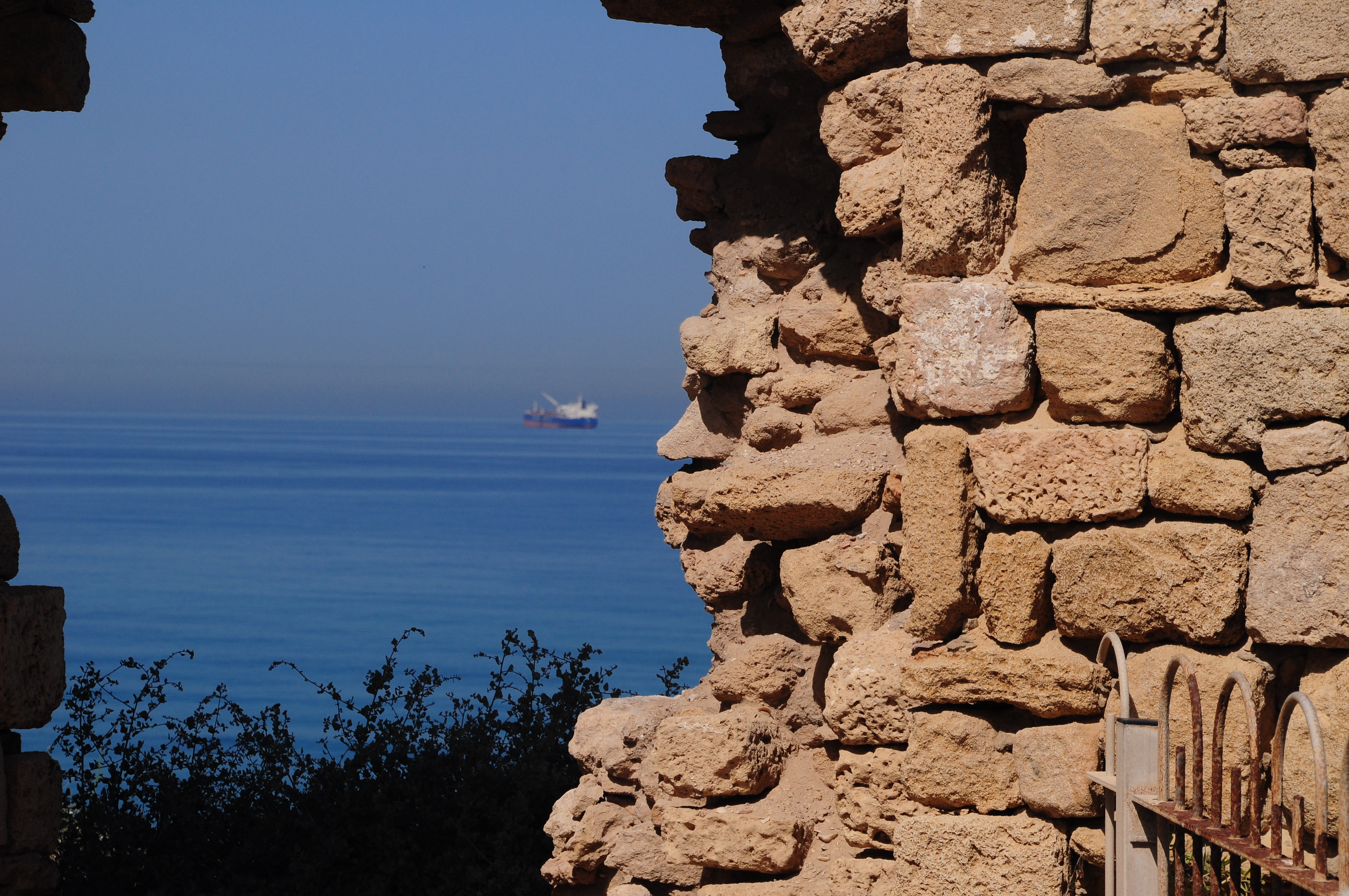 17458 Ashkelon